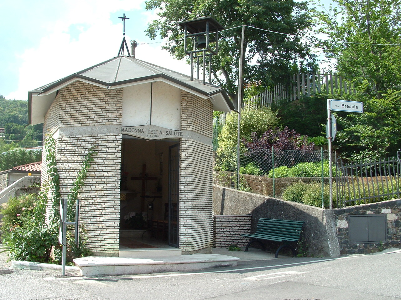 Capitello Madonna della Salute di Arzignano